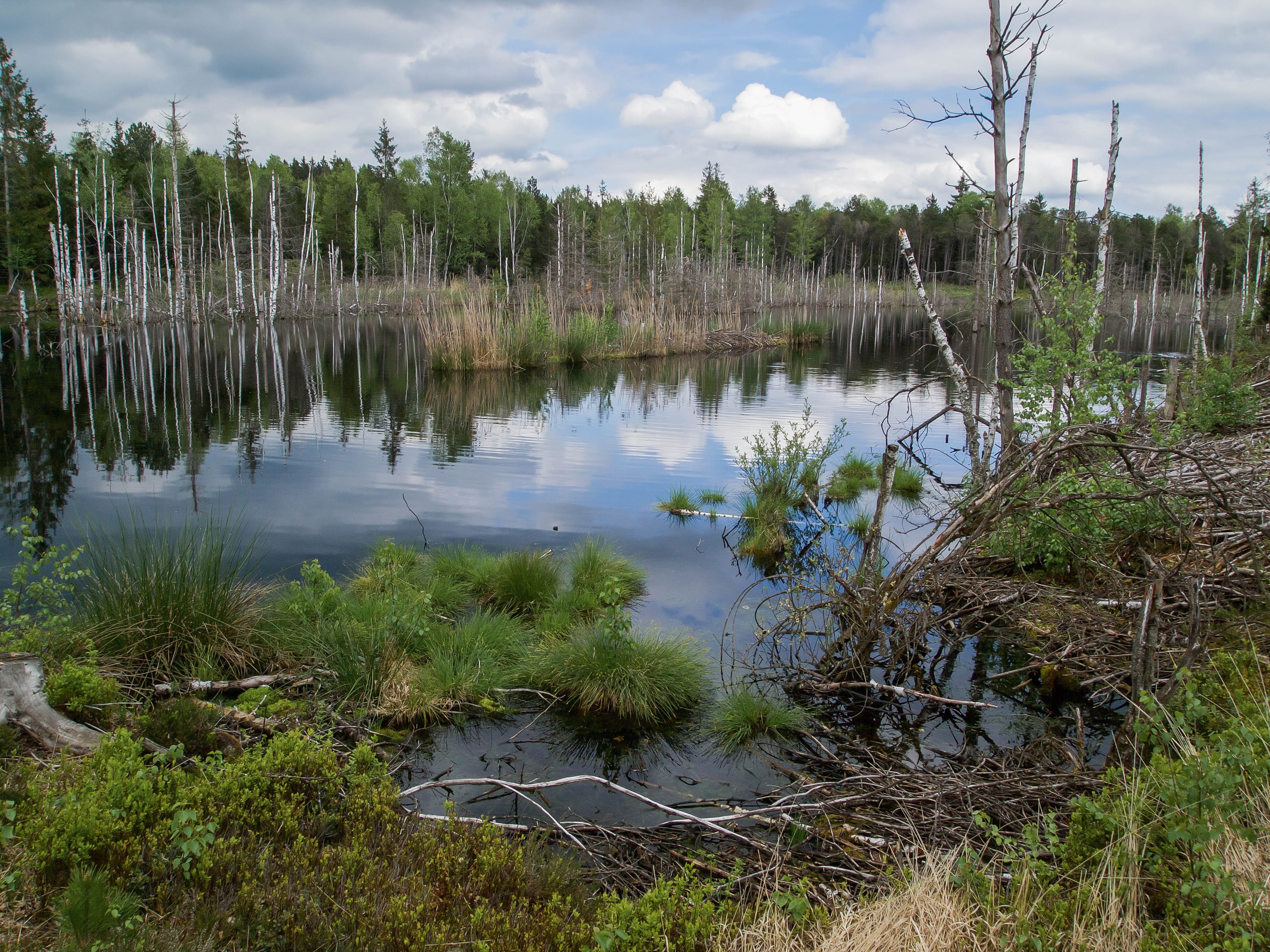 Blick von Westen auf das Schwarzlaichmoor (NSG 00057.01) bei Hohenpeißenberg, Oberbayern.